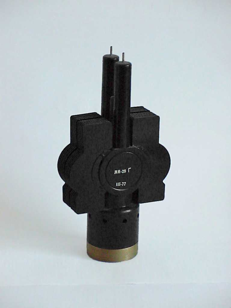 Magnetron aus dem vierten Sender des russischen Radars P-37 (NATO-Bezeichnung: "Bar Lock")